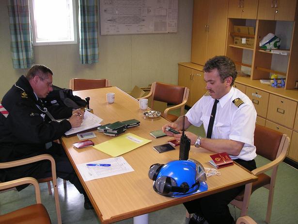 Een Collega Grenstoezicht ab bezig met Grenstoezichtwerkzaamheden. Zeehavenpolitie.